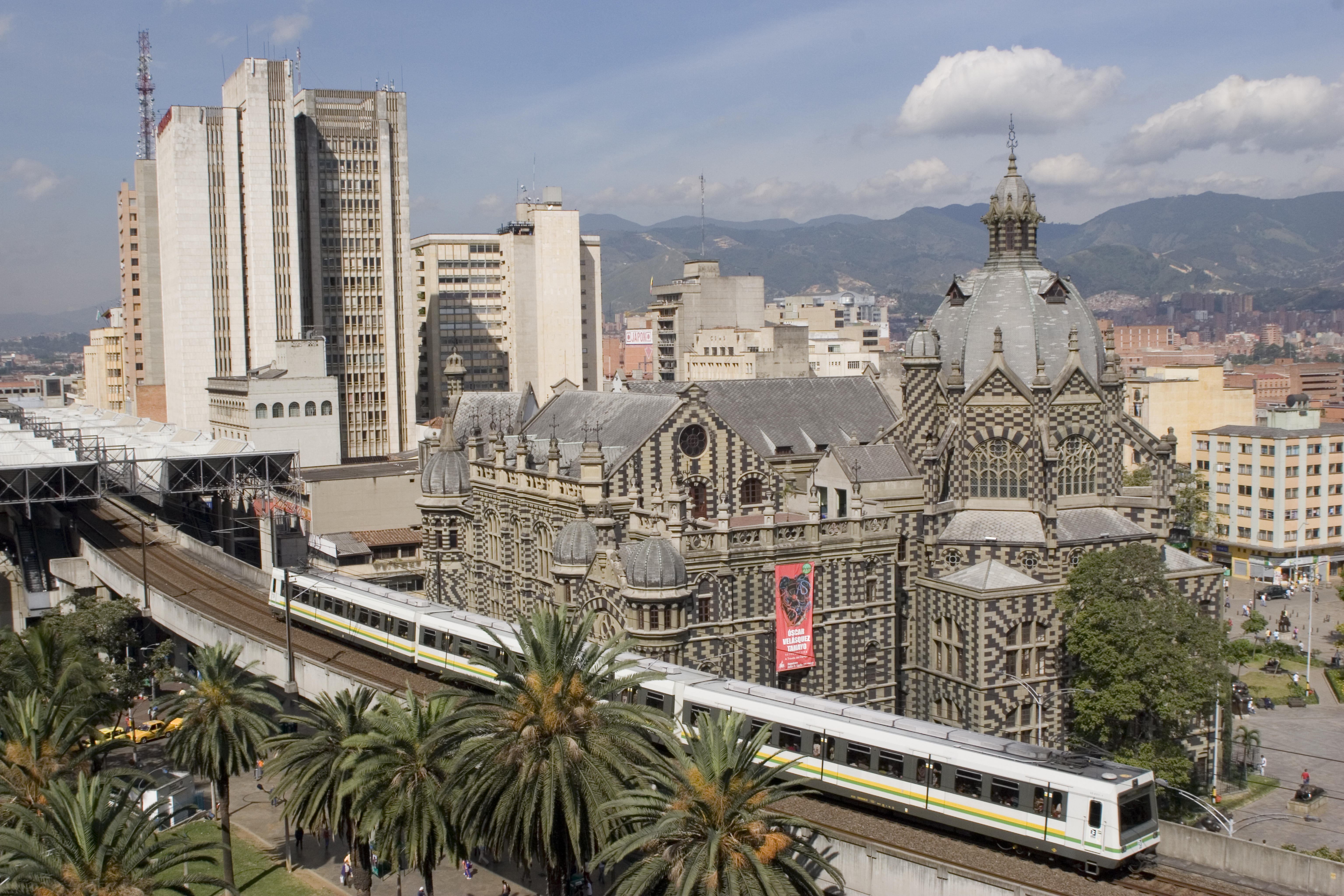 Metro de Medellín